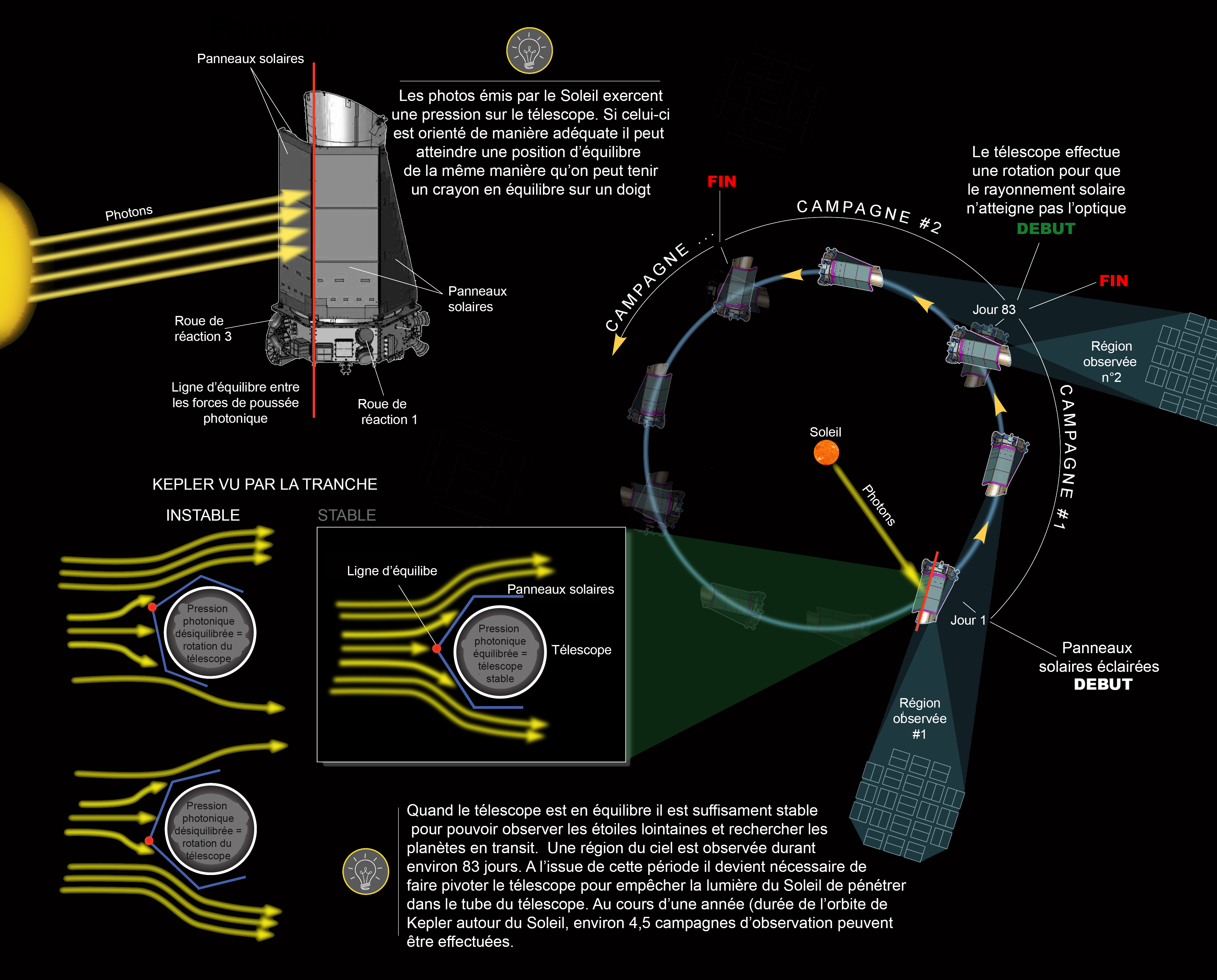 Sur son orbite héliocentrique, le télescope spatial Kepler est soumis principalement à la pression de rayonnement c'est-à-dire la poussée exercée par les photons. A la suite de la panne des roues de réaction, Kepler ne pouvant plus maintenir son orientation que dans deux dimensions, les ingénieurs ont imaginé d'utiliser cette poussée des photons pour maintenir le pointage du télescope spatial. Pour subir une poussée symétrique de la part de ces particules tout en maintenant le télescope pointé vers une portion du ciel fixe, l'axe du télescope est positionné de manière à être parallèle à son plan orbital. Pour que le Soleil ne pénètre pas dans l'ouverture du télescope, son orientation est modifiée tous les 83,5 jours ce qui impose à chaque fois un changement de la région de l'espace étudiée.